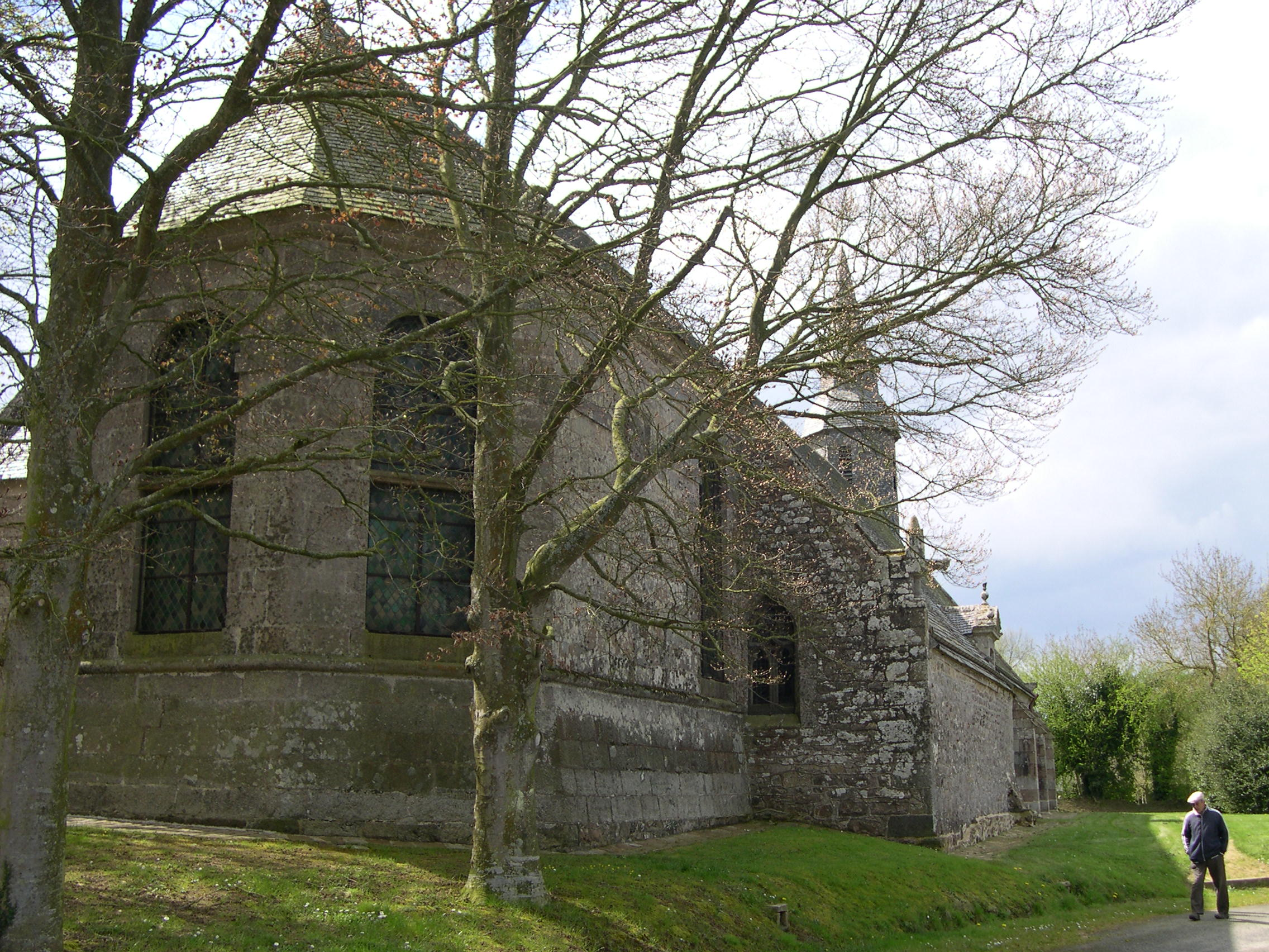 Chapelle de Kermaria